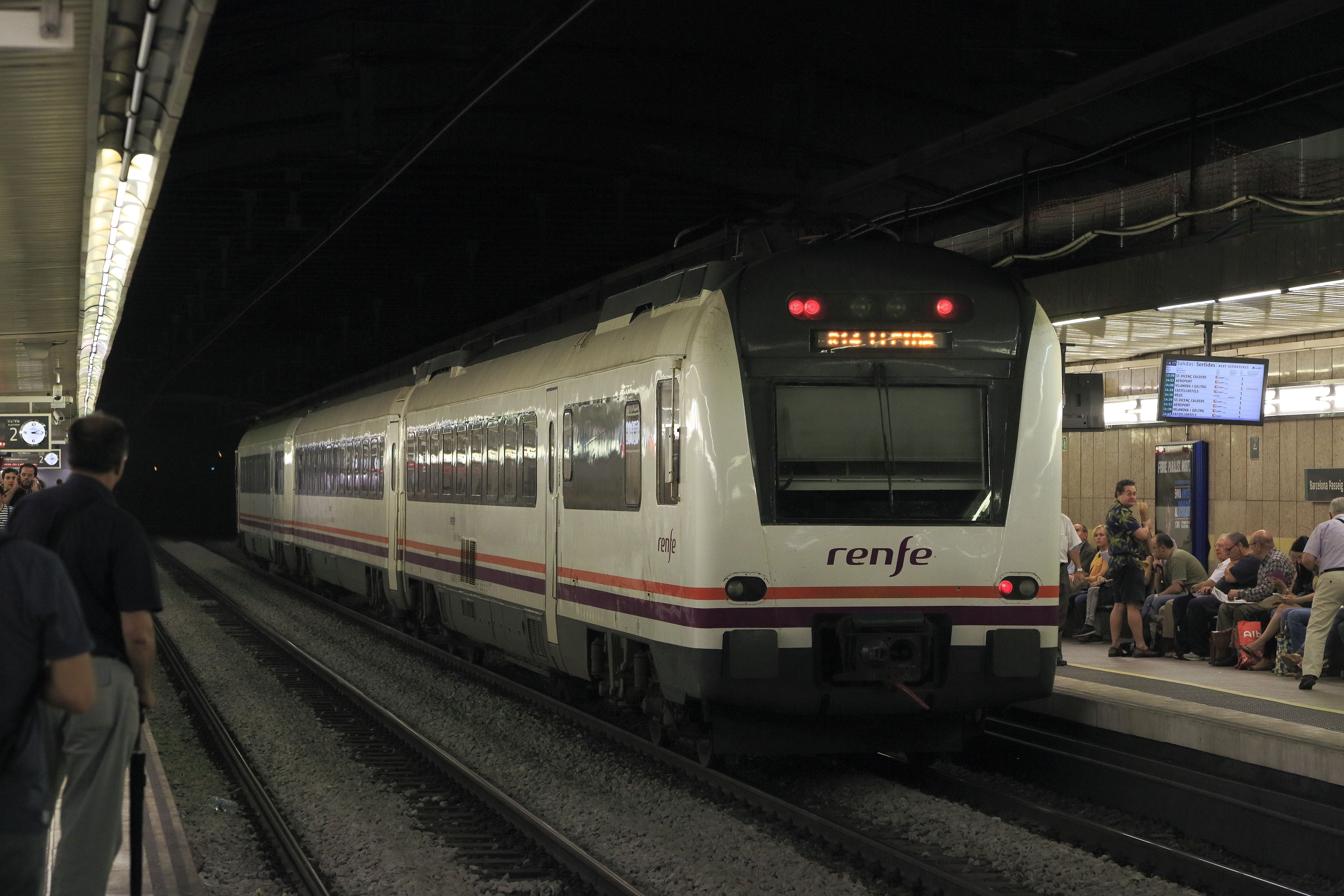 »electrotrén« der BR 448 nach Modernisierung und Umbau für den Regionalverkehr. Nachschuss, der Triebwagen läuft am Schluss.